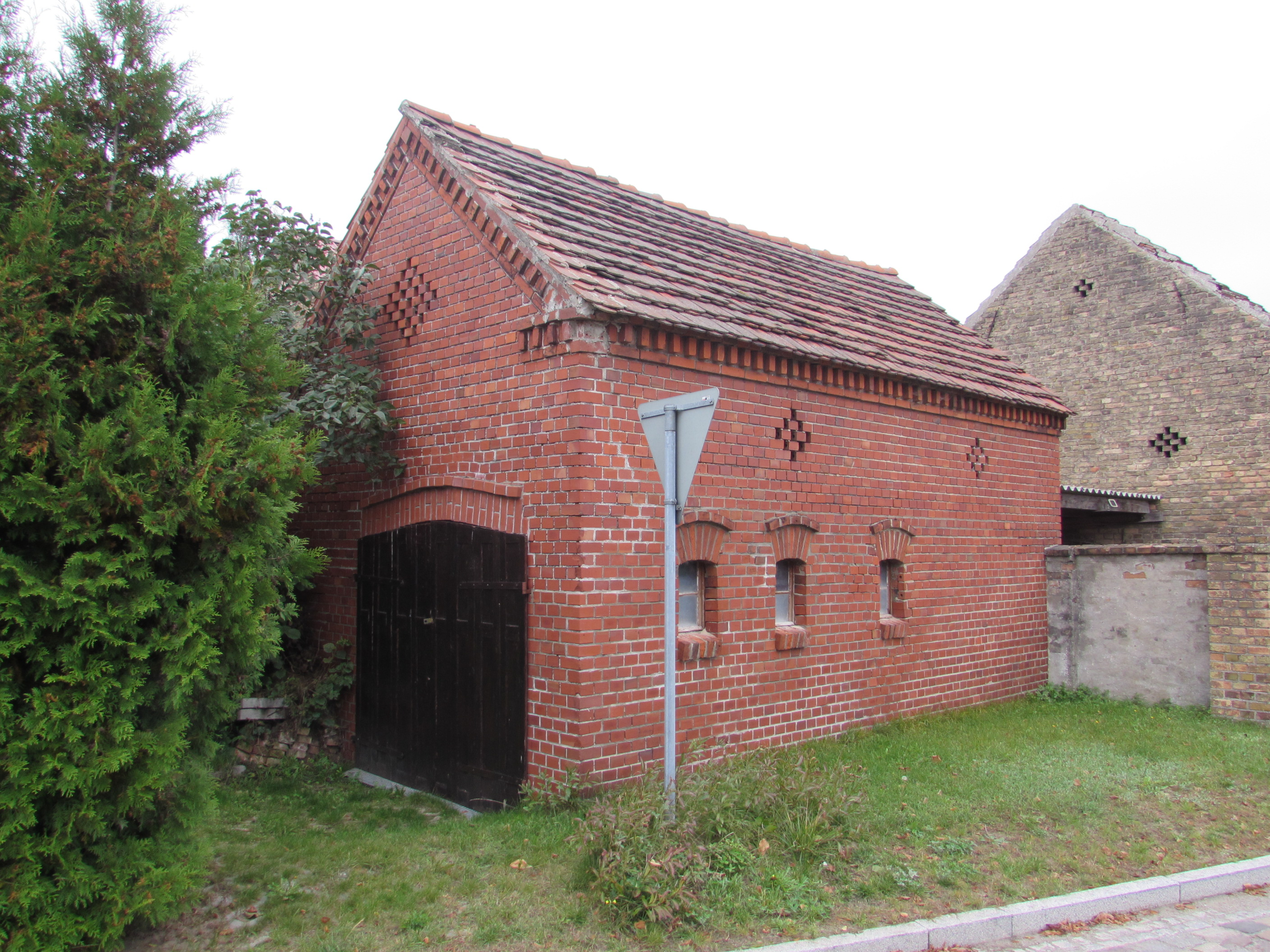 Stall kirchen- und schulhaus tieckow